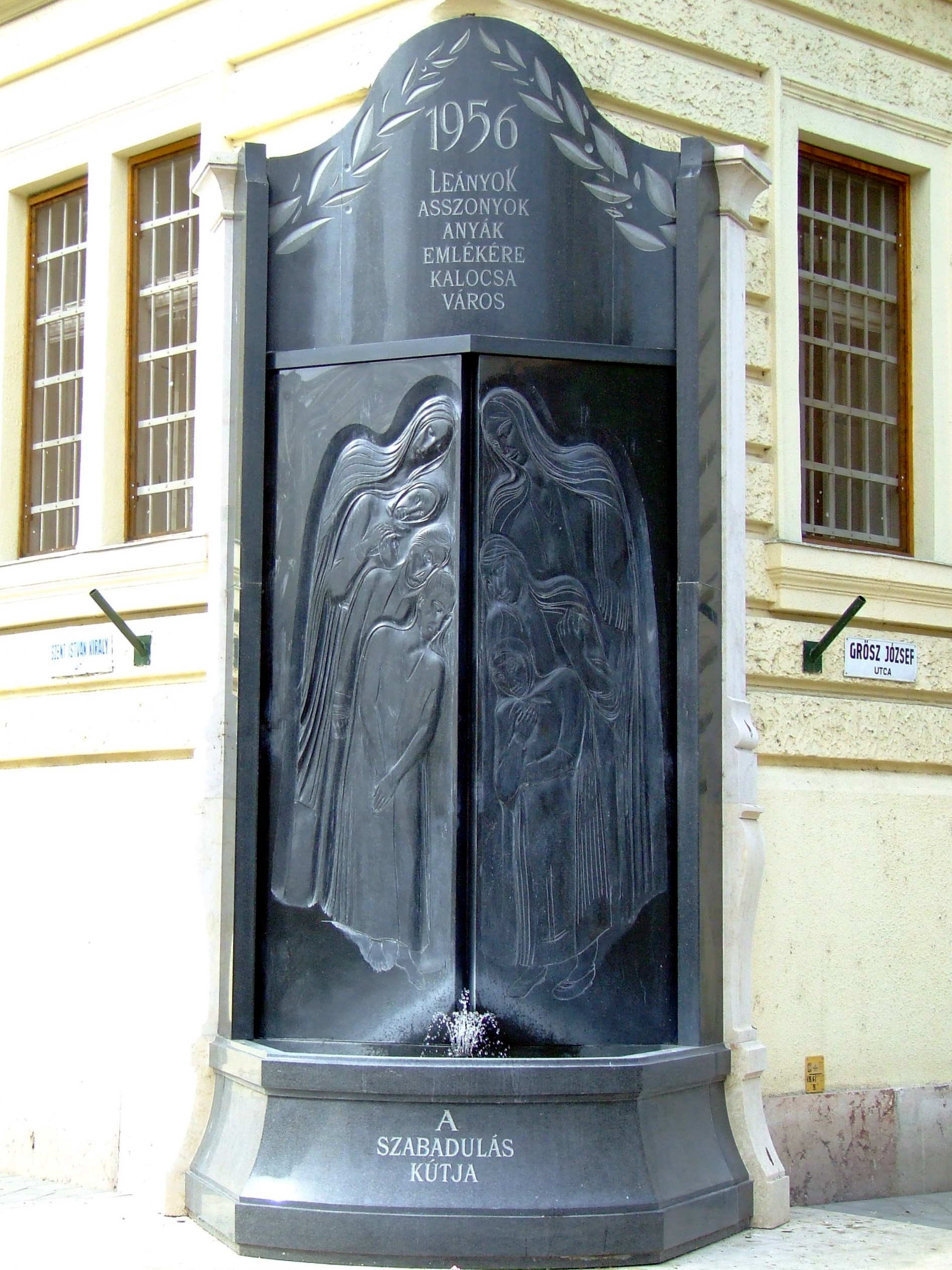 A szabadulás kútja Kalocsán. Benedek György alkotása (2006)